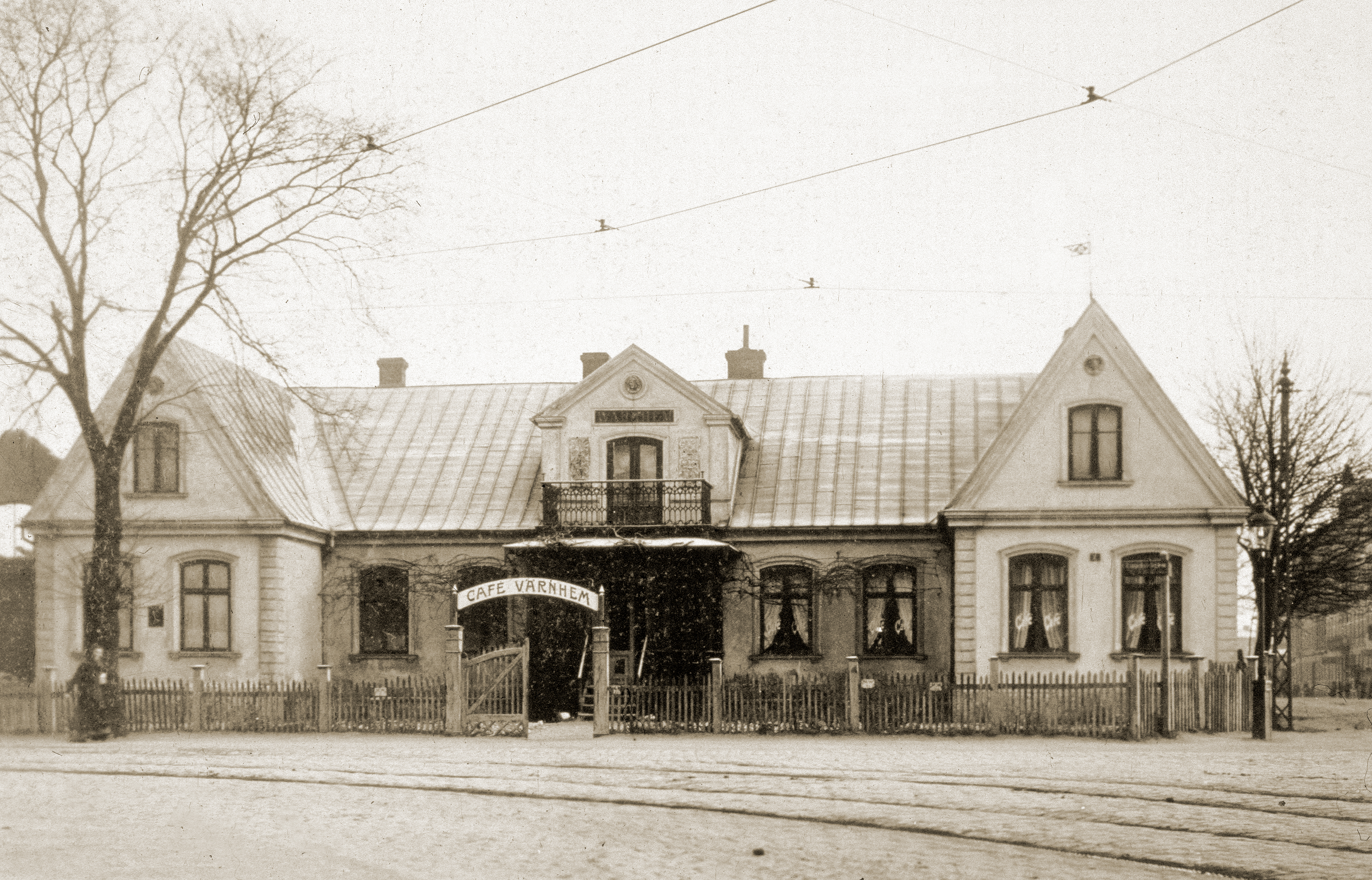 Bondgården Värnhem i Malmö på 1880-talet.